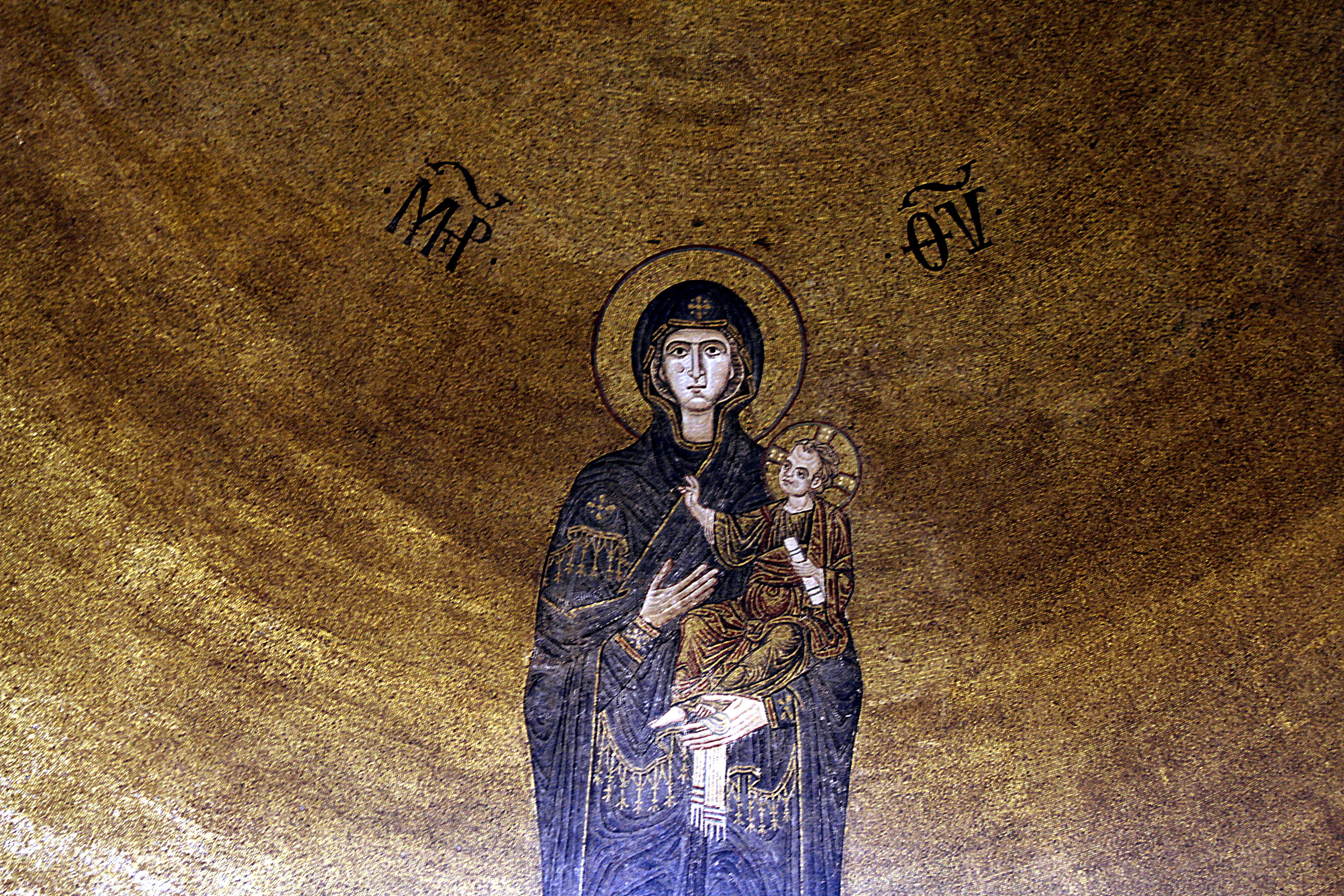 Apse mosaic - Santa Maria Assunta (Torcello) - Venice